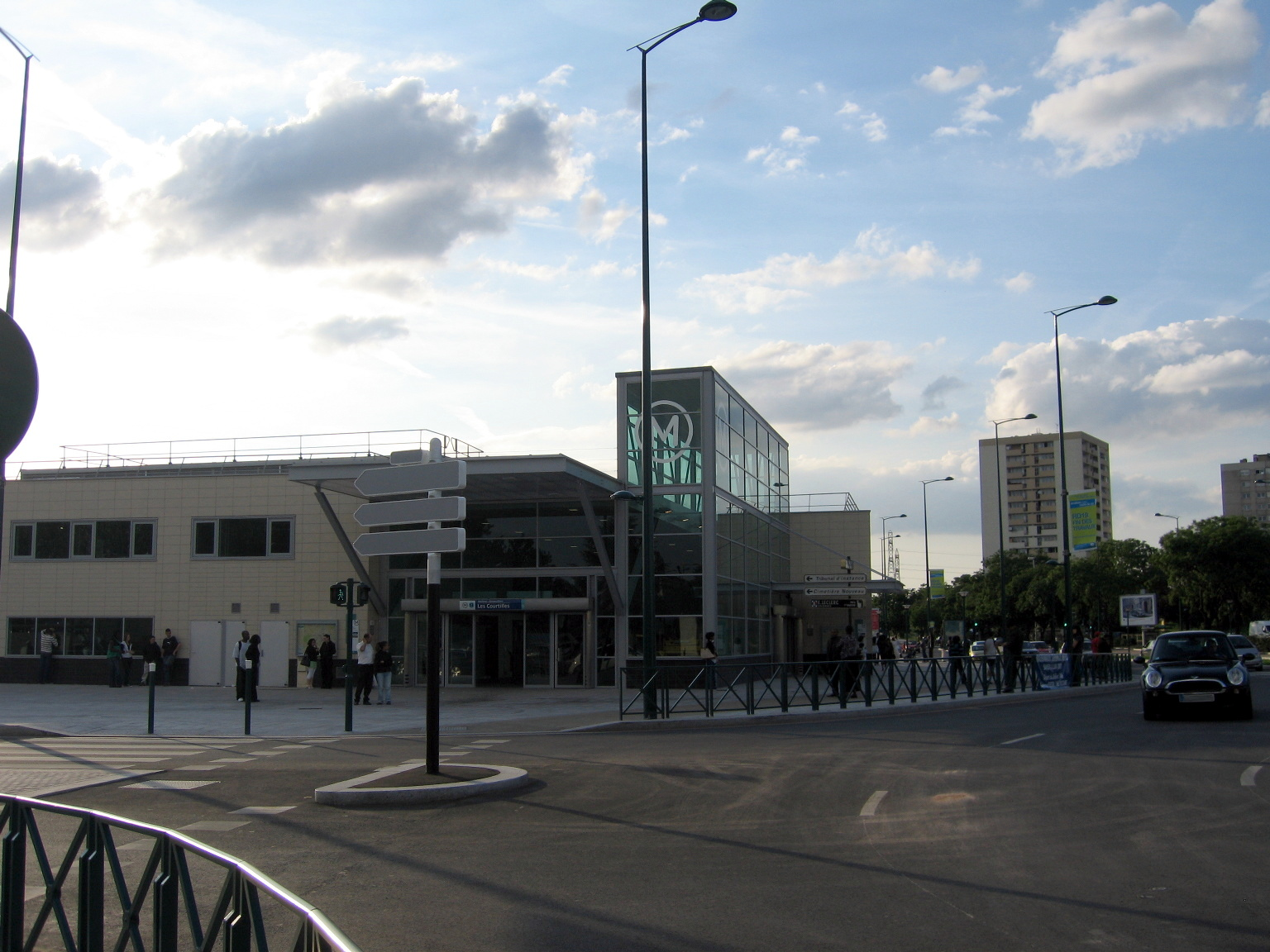 Asnières - Gennevilliers - Les Courtilles, ligne 13 du métro de Paris, le jour de l'inauguration.